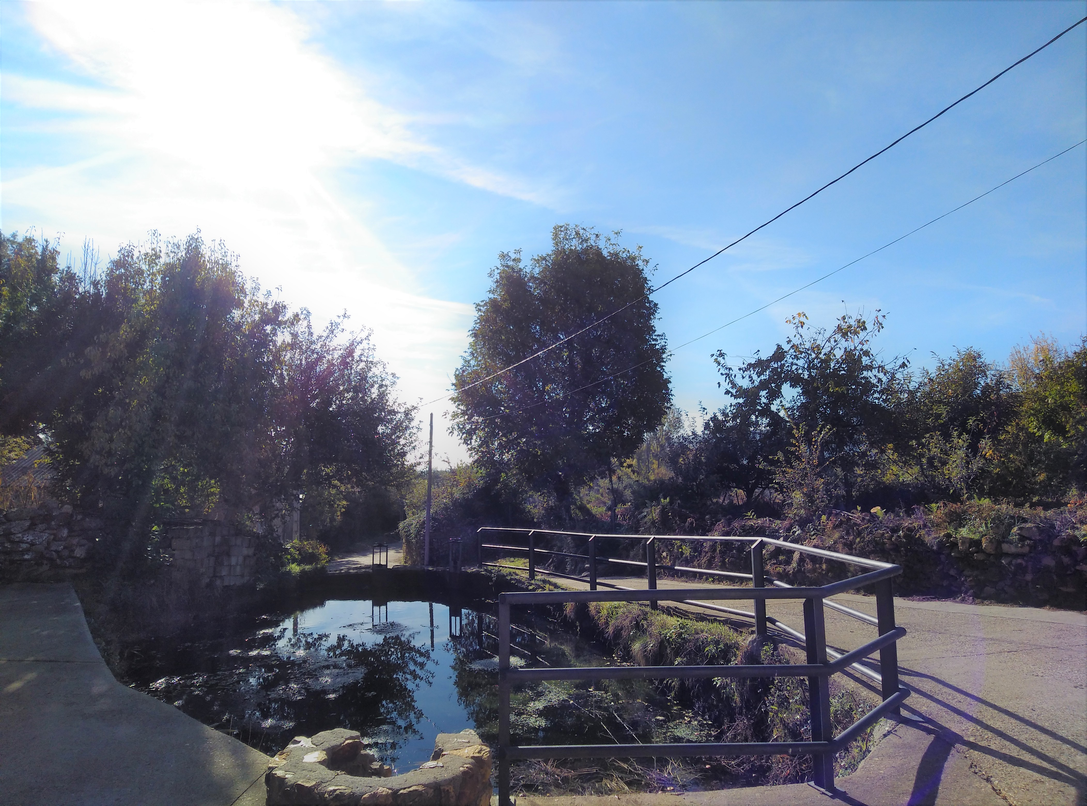 Detalle de sendero en el pueblo sanabrés de Doney de la Requejada